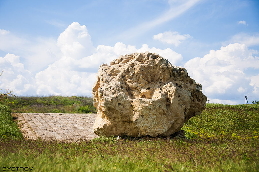 Каменская Сечь.